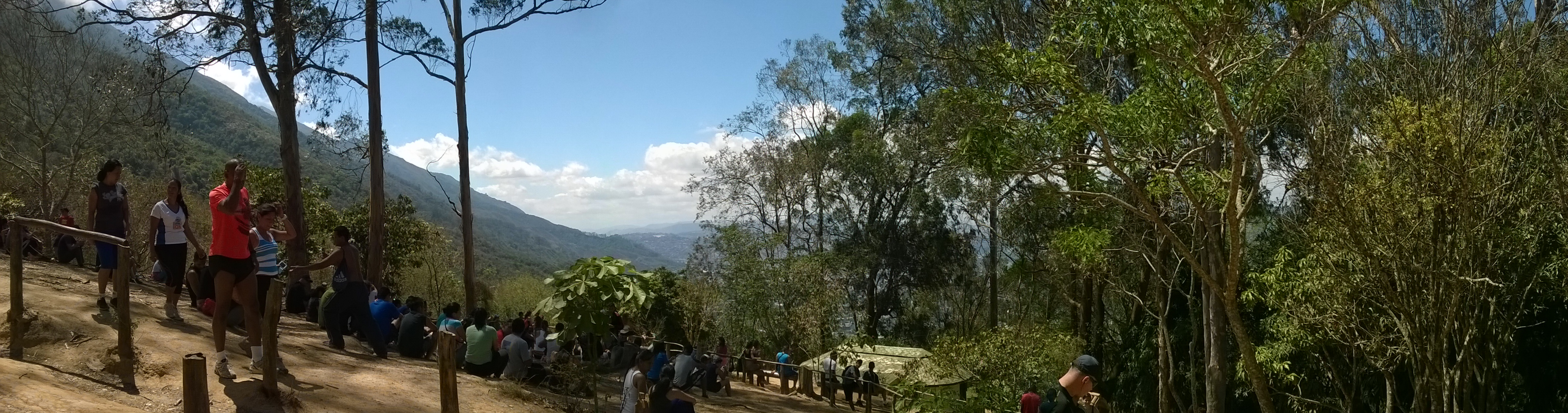 una foto desde sabas nieves de como se ve el avila un domingo por la mañana...